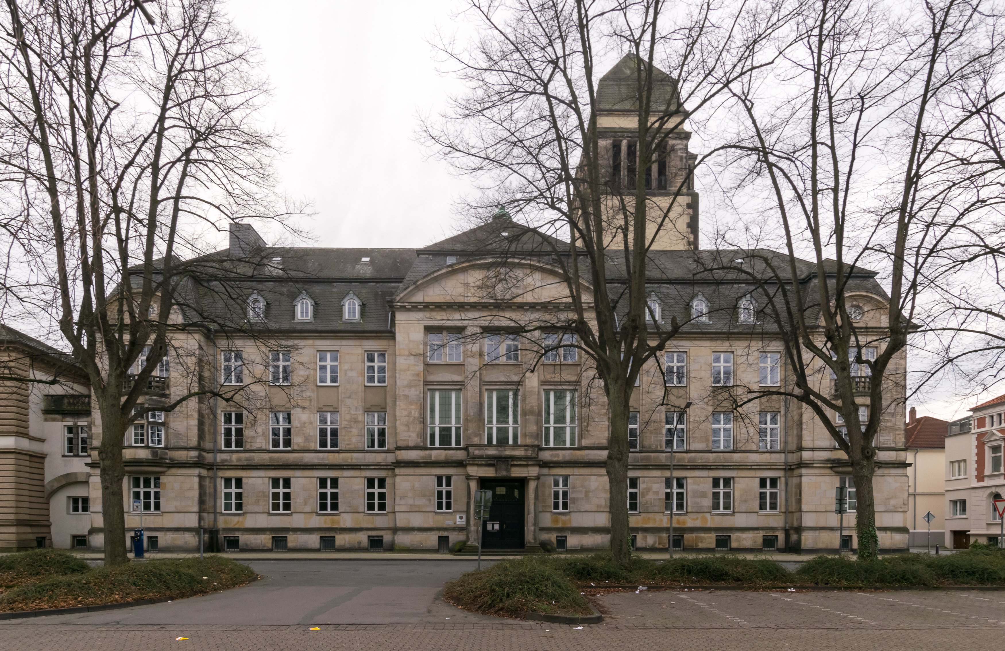 Amtsgericht Detmold, ehemalige Fürstlich Lippische Regierung; mit Weitwinkelobjektiv vom Parkplatz